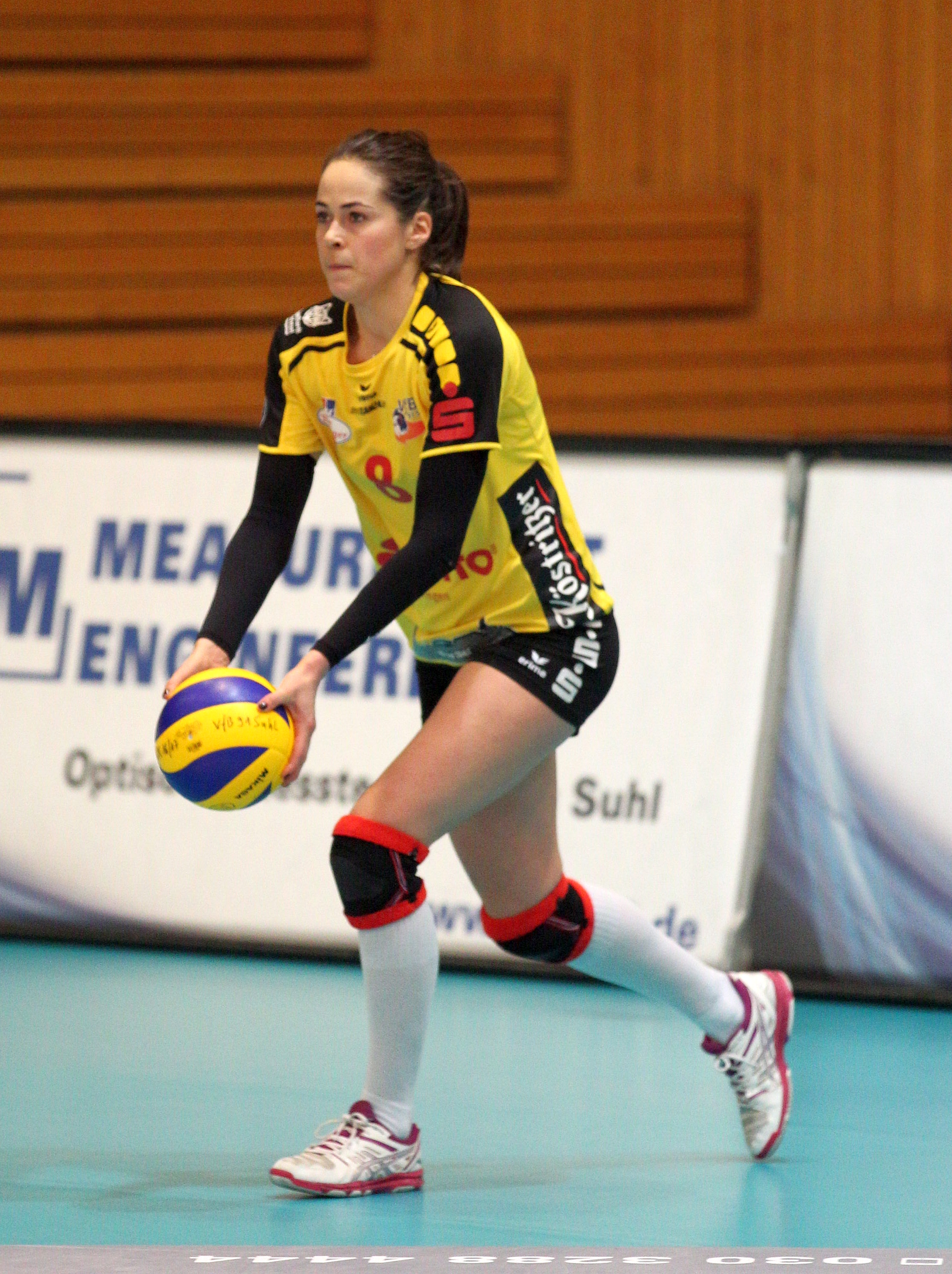 Laurianne Delabarre (VfB Suhl LOTTO Thüringen)